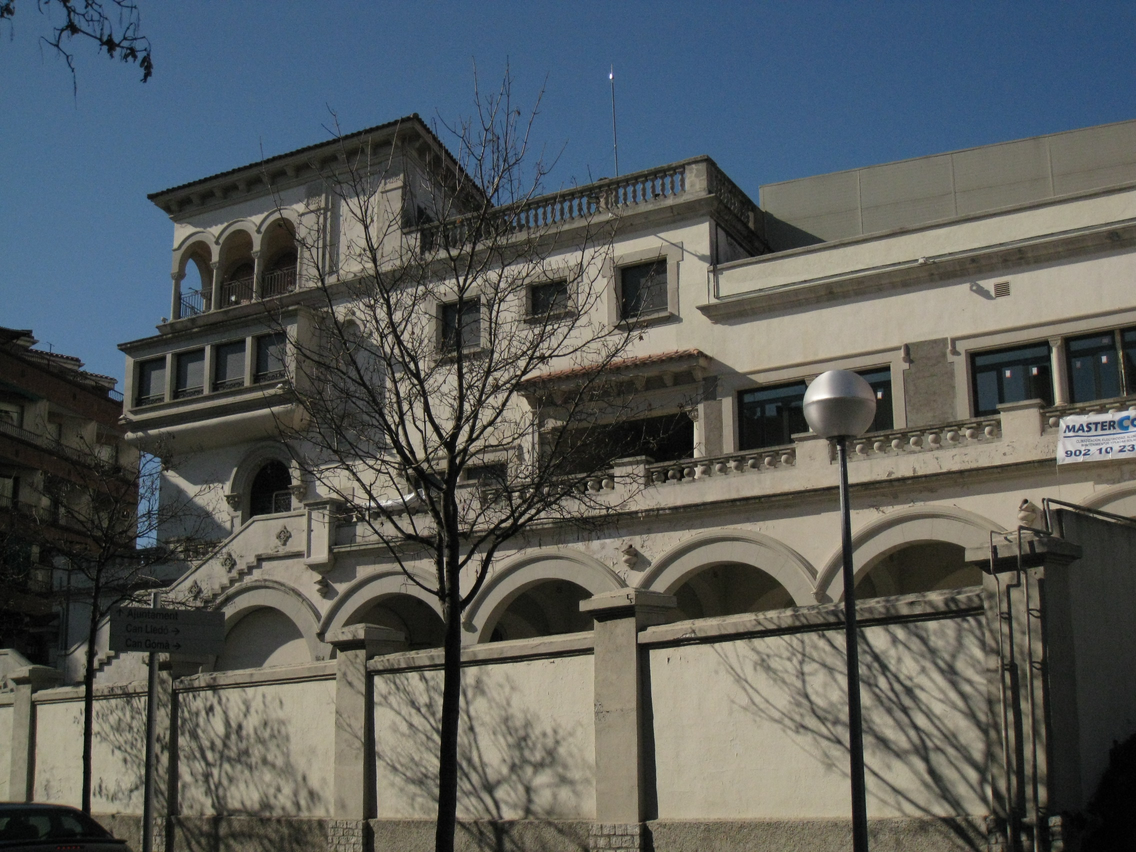 Can Gomà (Mollet del Vallès)